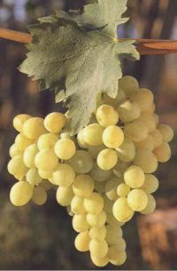 Fonte: Licenza: OTRS tkt #2006110910007712